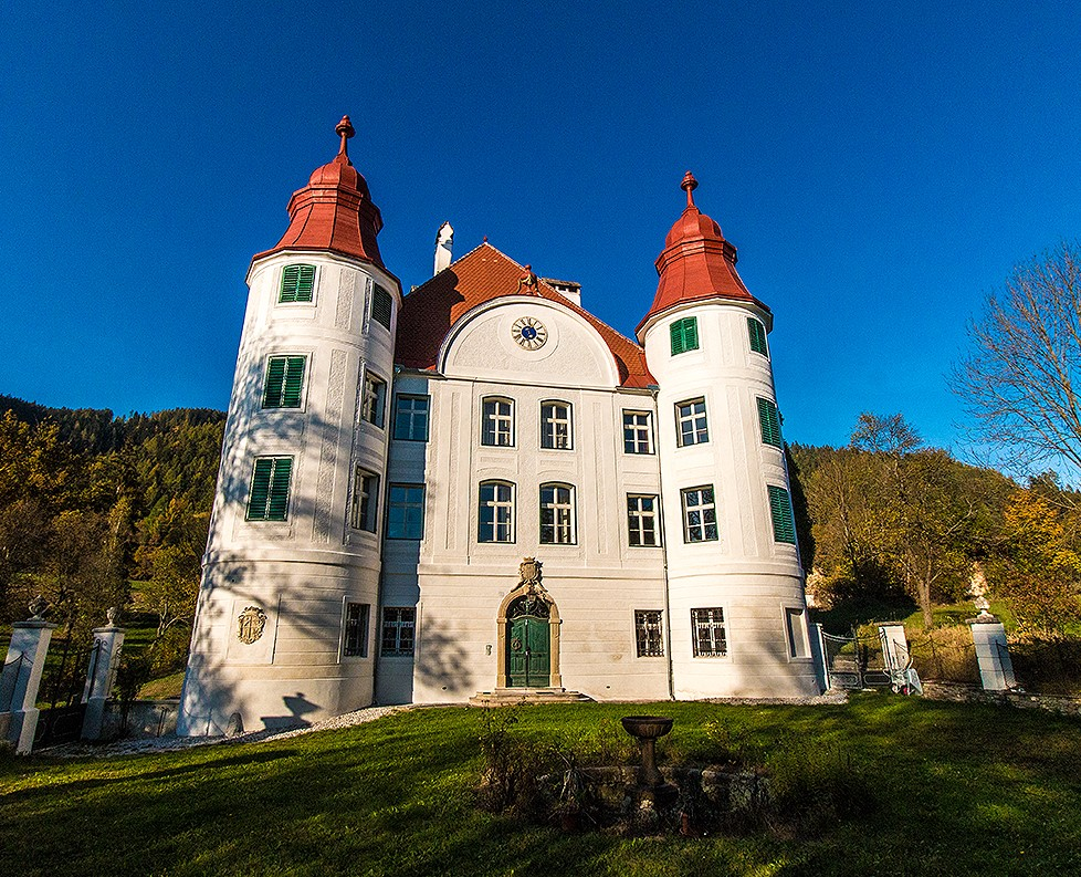 Schloss Nechelheim, in Sankt Lorenzen im Mürztal, Steiermark, Österreich.